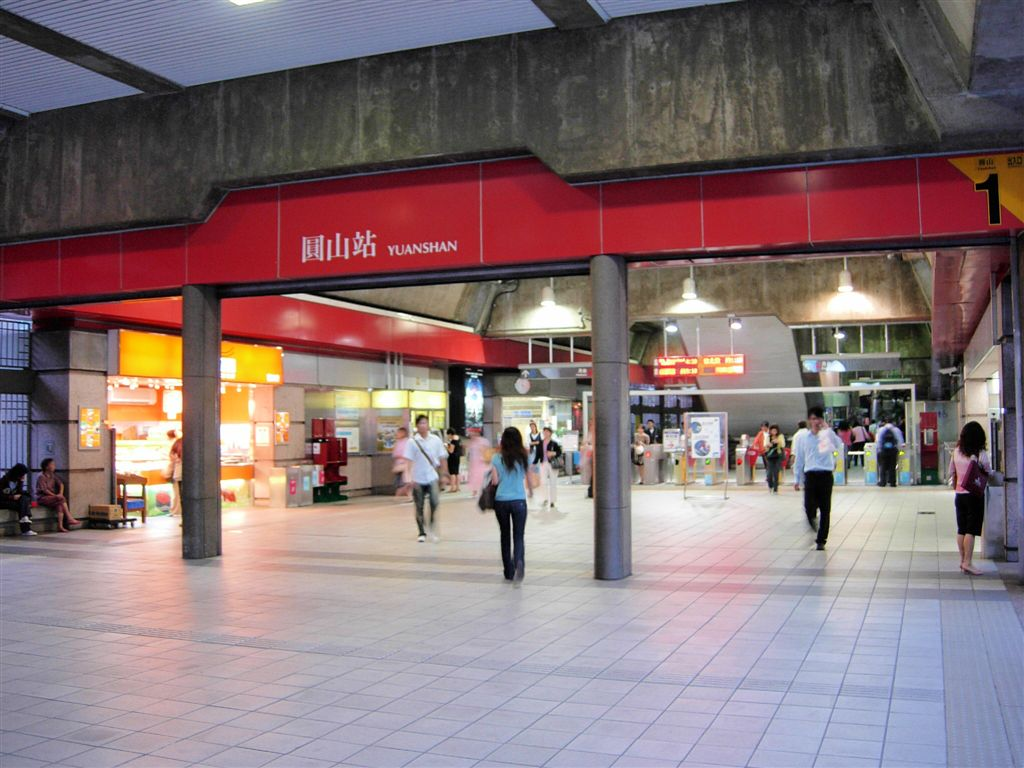 臺北捷運圓山站1號出口。